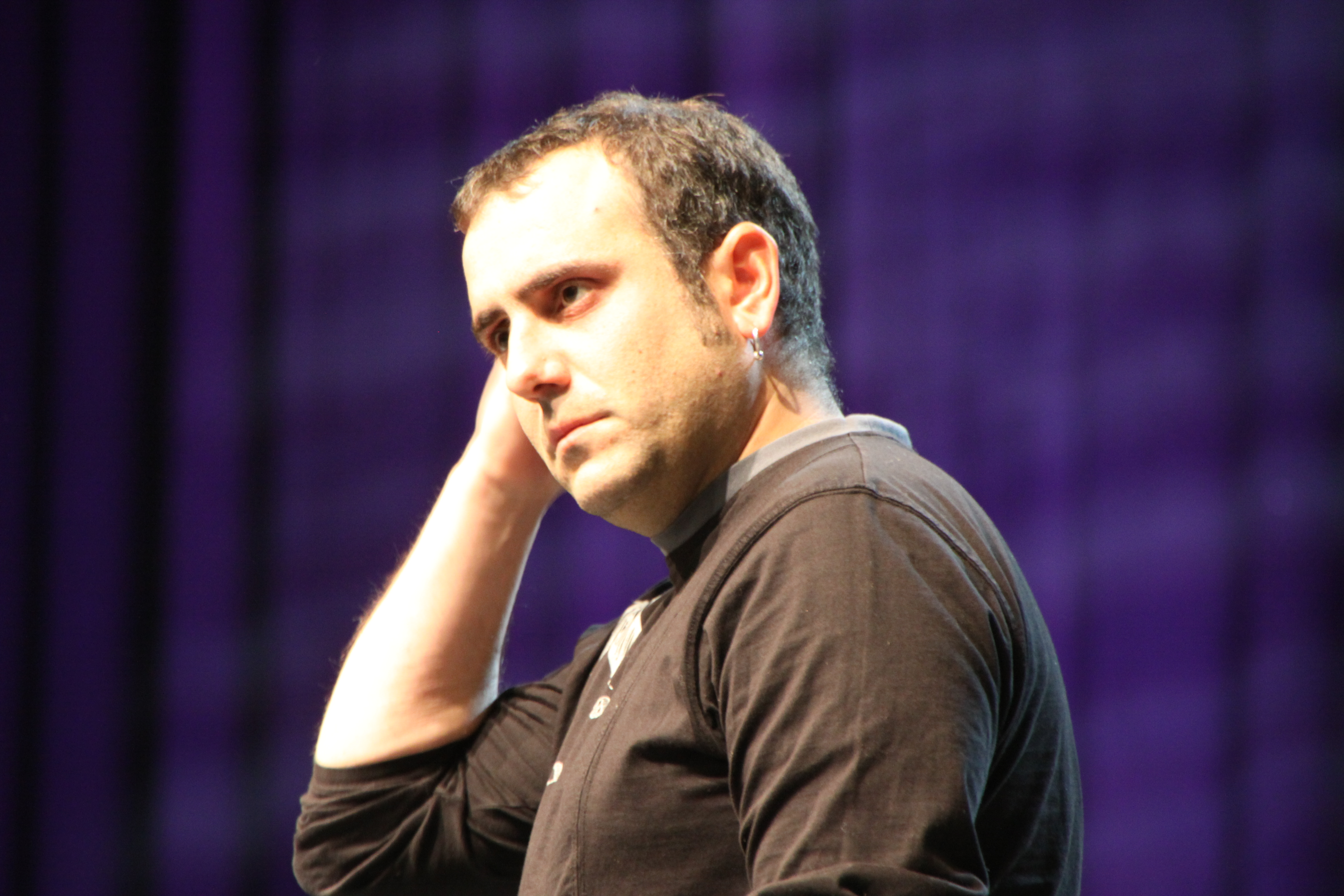 2013ko abenduaren 15ean jokatu zen Barakaldoko BECen Bertsolari Txapelketa Nagusia. Maialen Lujanbio, Aitor Mendiluze, Amets Arzallus, Sustrai Colina, Aitor Sarriegi, Beñat Gaztelumendi, Igor Elortza eta Unai Iturriaga igo ziren oholtzara, 13.500 bertsozaleren aurrean. Bertsolari Txapelketa Nagusia 2017. Egilea: Uribe Kosta eta Erandioko agerkaria.